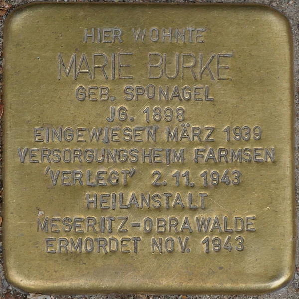 Stolperstein Marie Burke